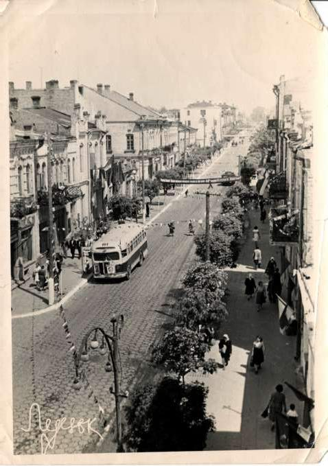 postcard